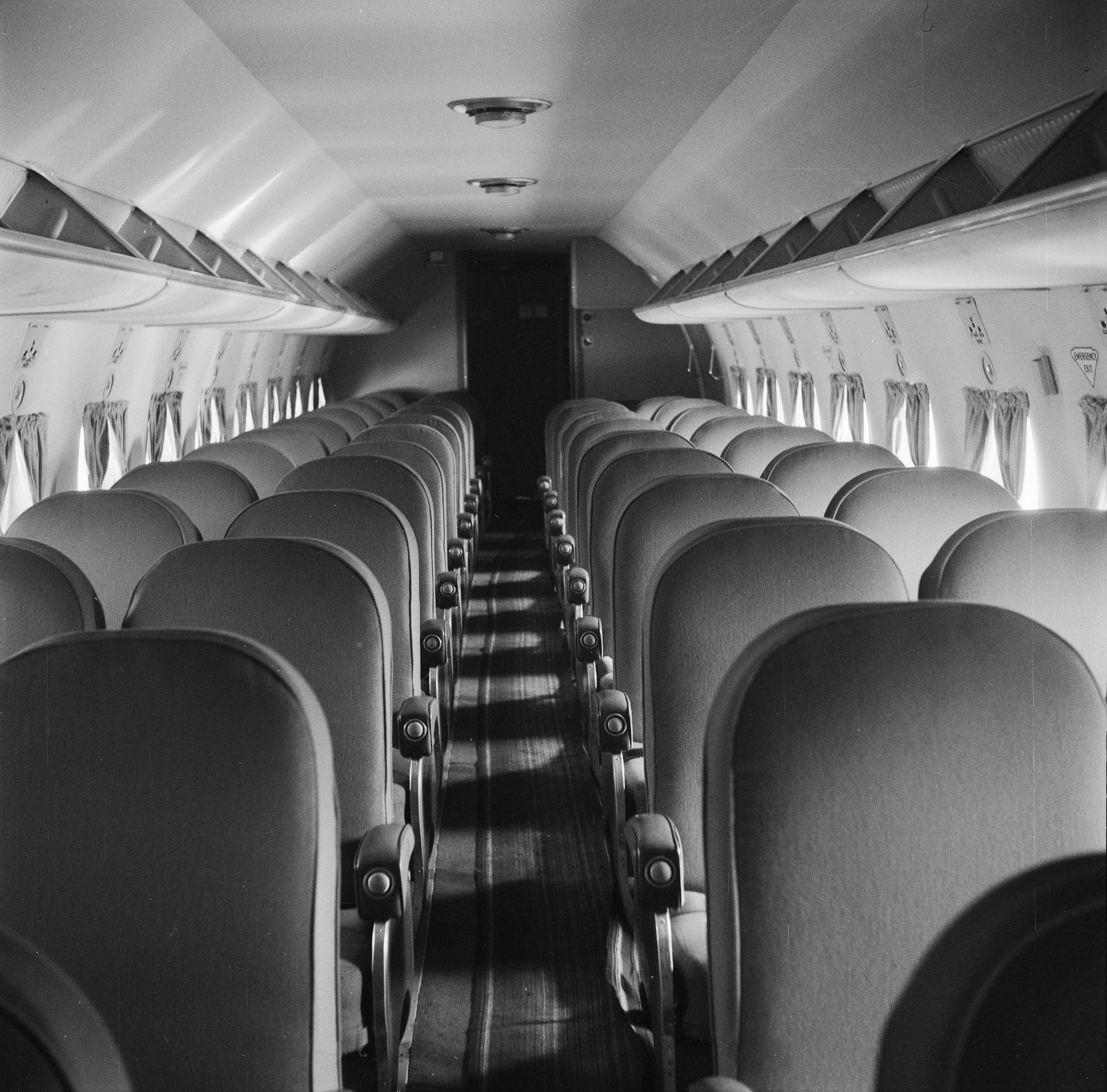 Kabine DC-4